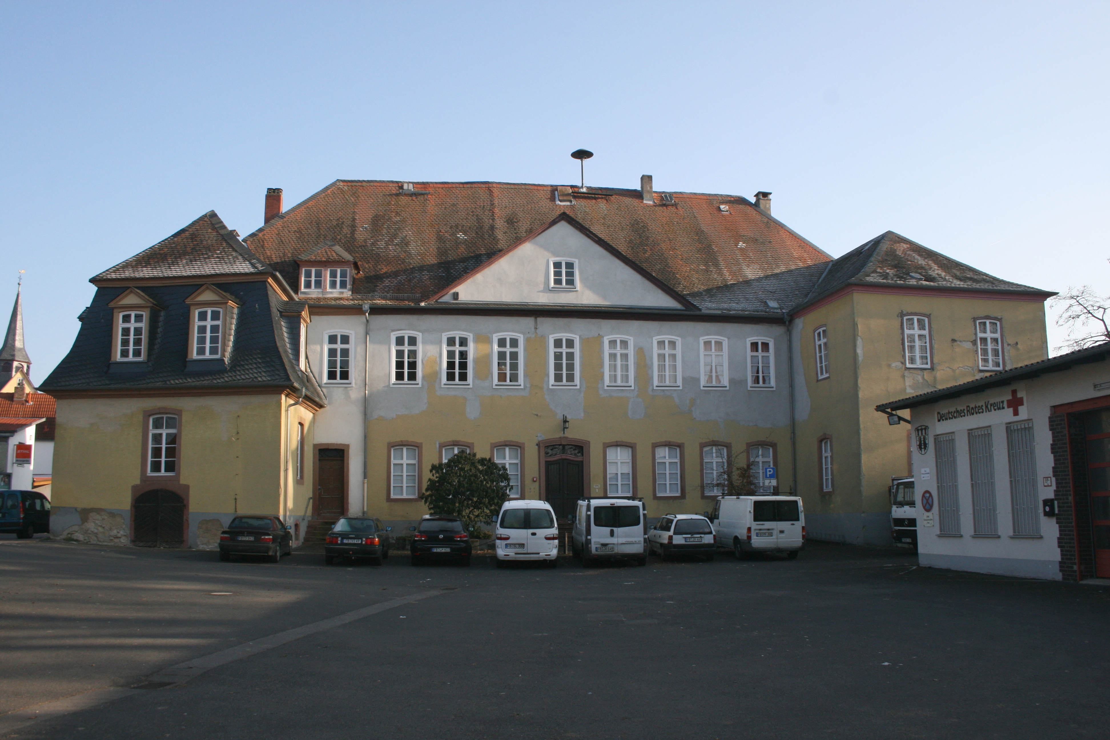 Degenfeld'sches Schloss in Groß-Karben, Wetteraukreis. Ansicht von Westen.